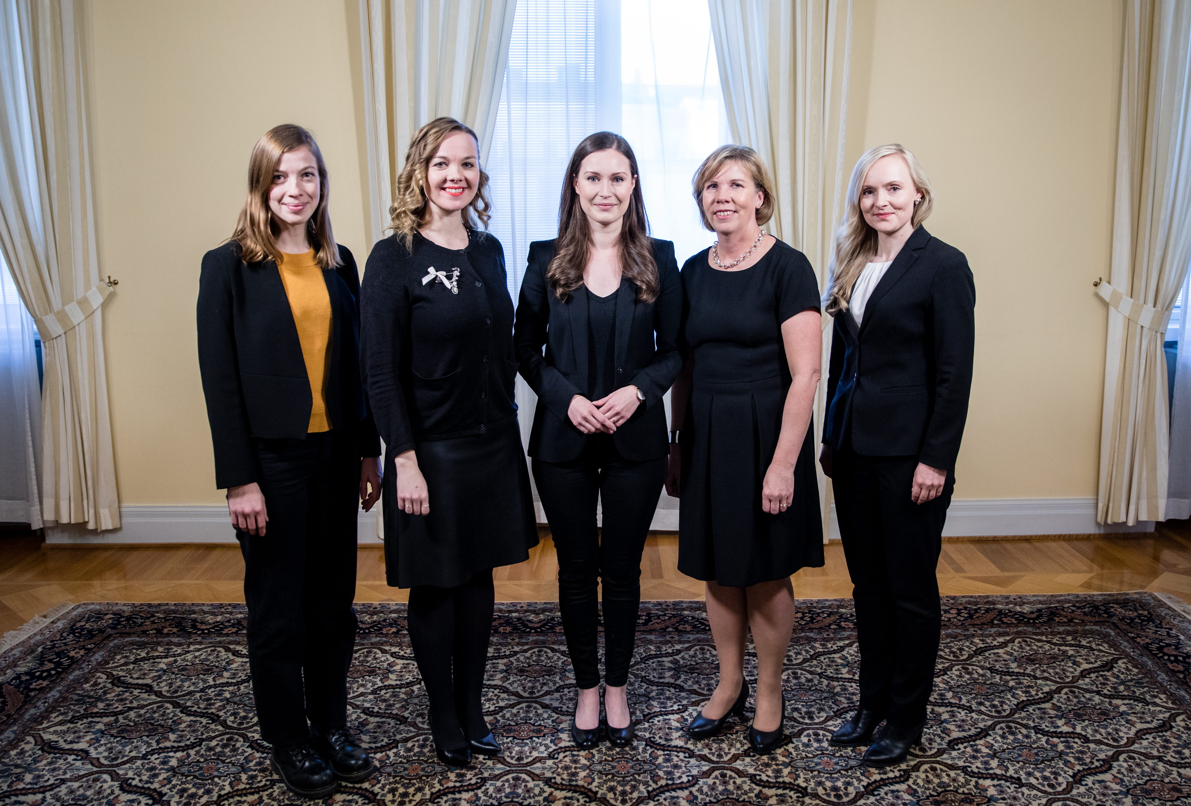 Yhteiskuvassa hallituksen ns. johtoviisikko: pääministeri Sanna Marin, valtiovarainministeri Katri Kulmuni, opetusministeri Li Andersson, oikeusministeri Anna-Maja Henriksson ja sisäministeri Maria Ohisalo.